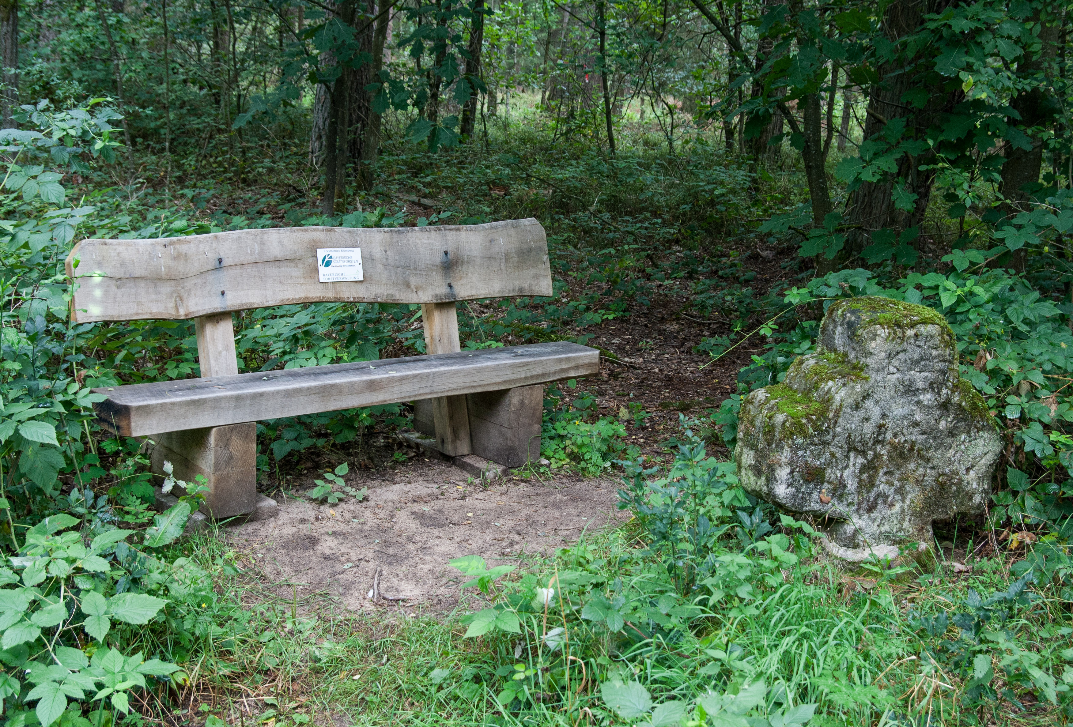 Steinkreuz